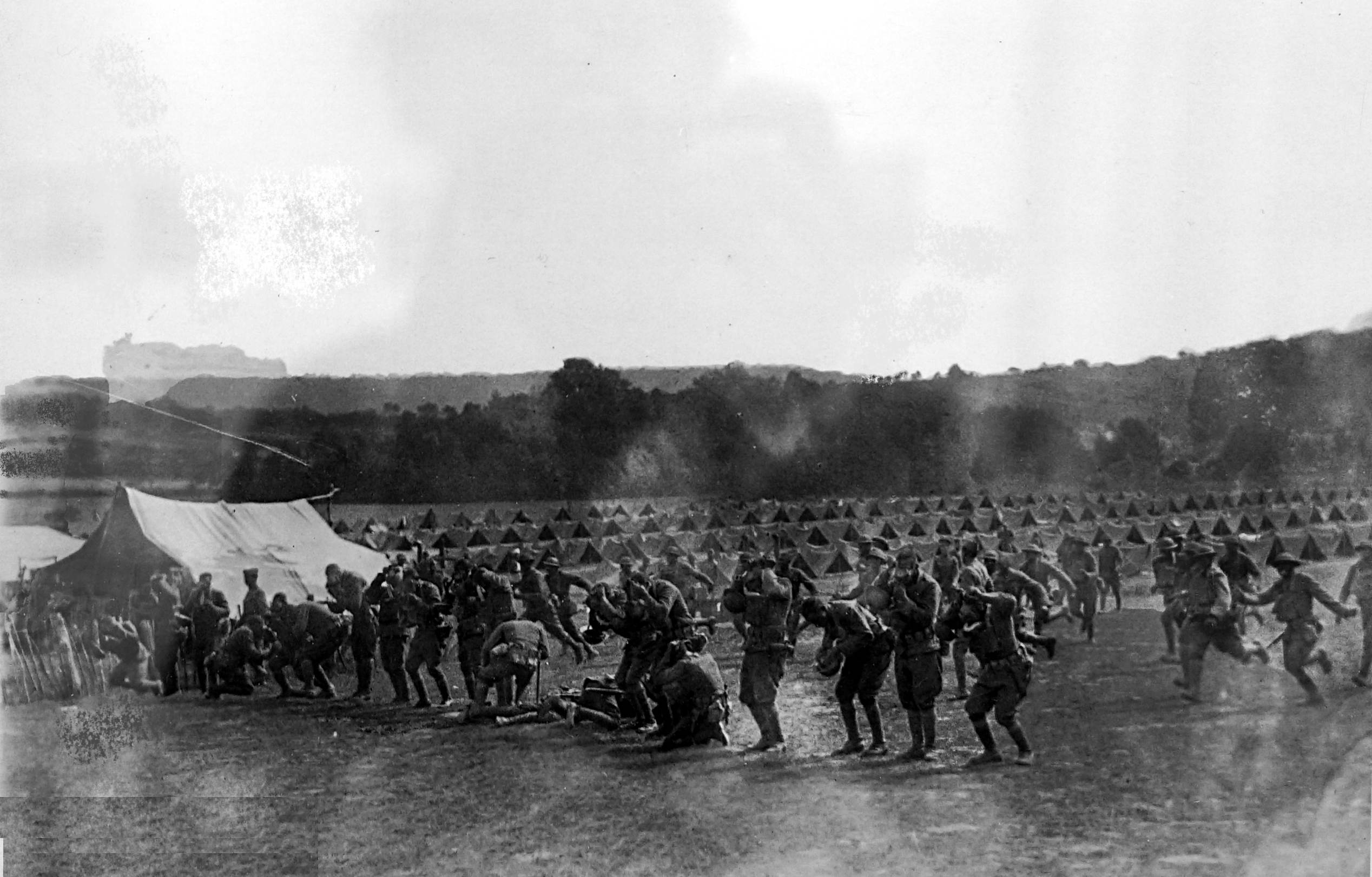 le 366eme régiment d'infanterie sur une vue ancienne.